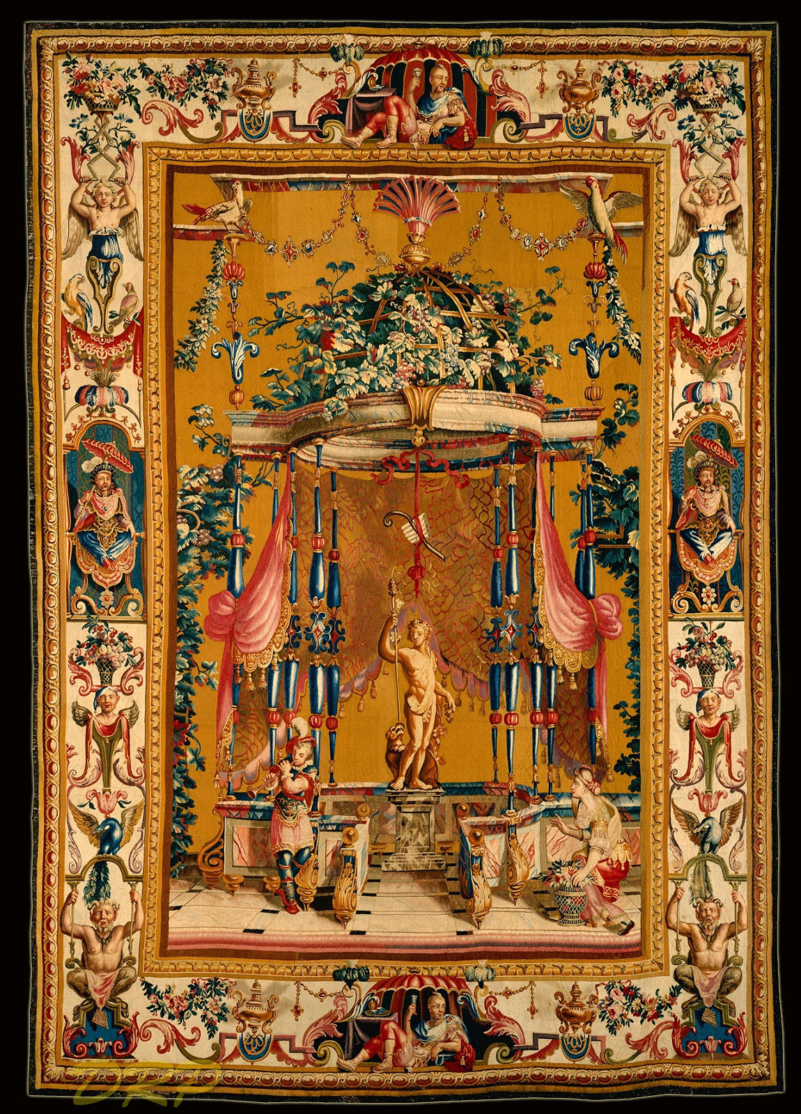 Шпалера из серии "Гротески на жёлтом фоне или фоне цвета испанского табака" по картонам Ж.-Б. Моннуайе (1689). "Подношение Бахусу"